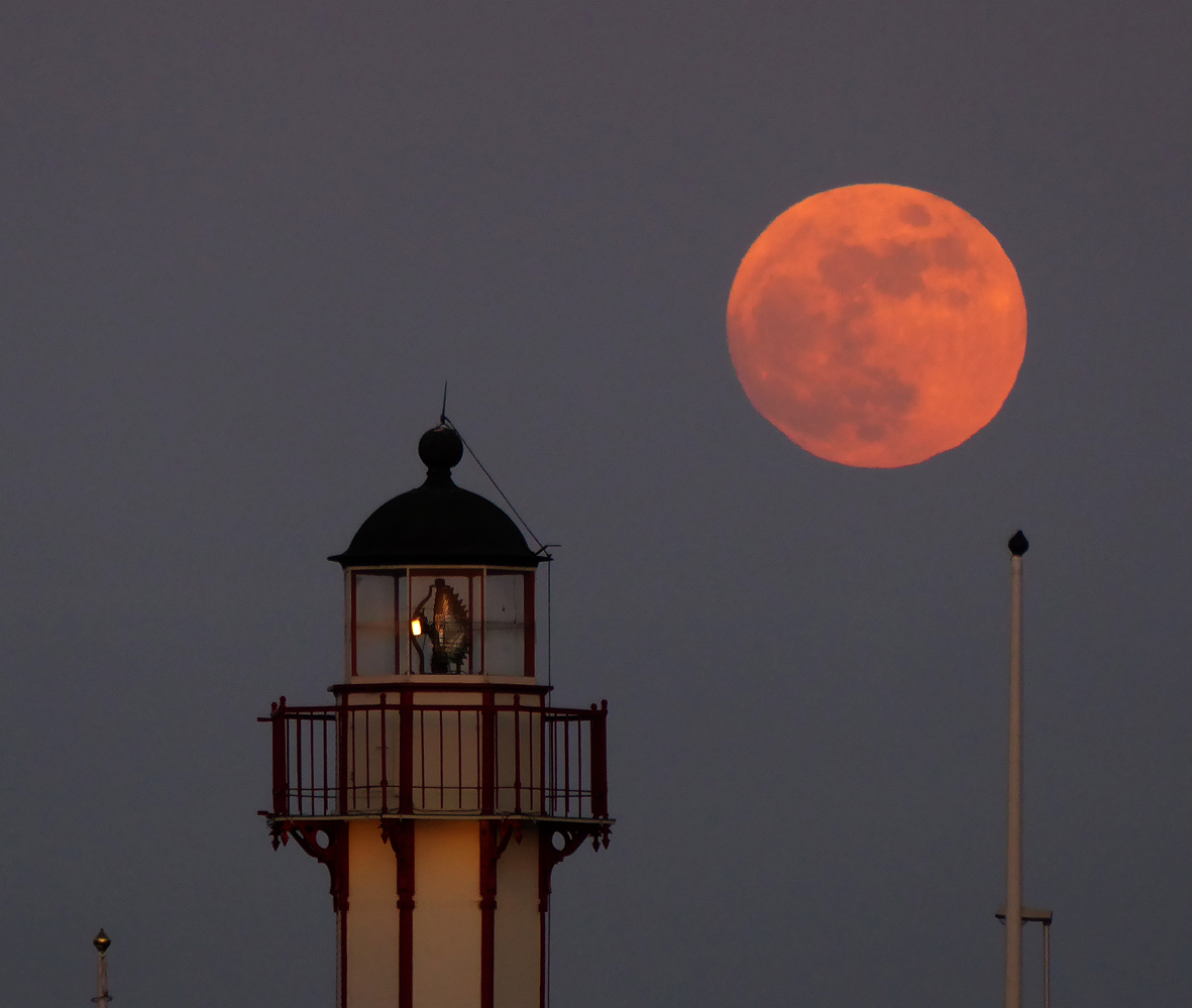 Fullmåne över gamla fyren i Ystads hamn. 11 feb 2017.